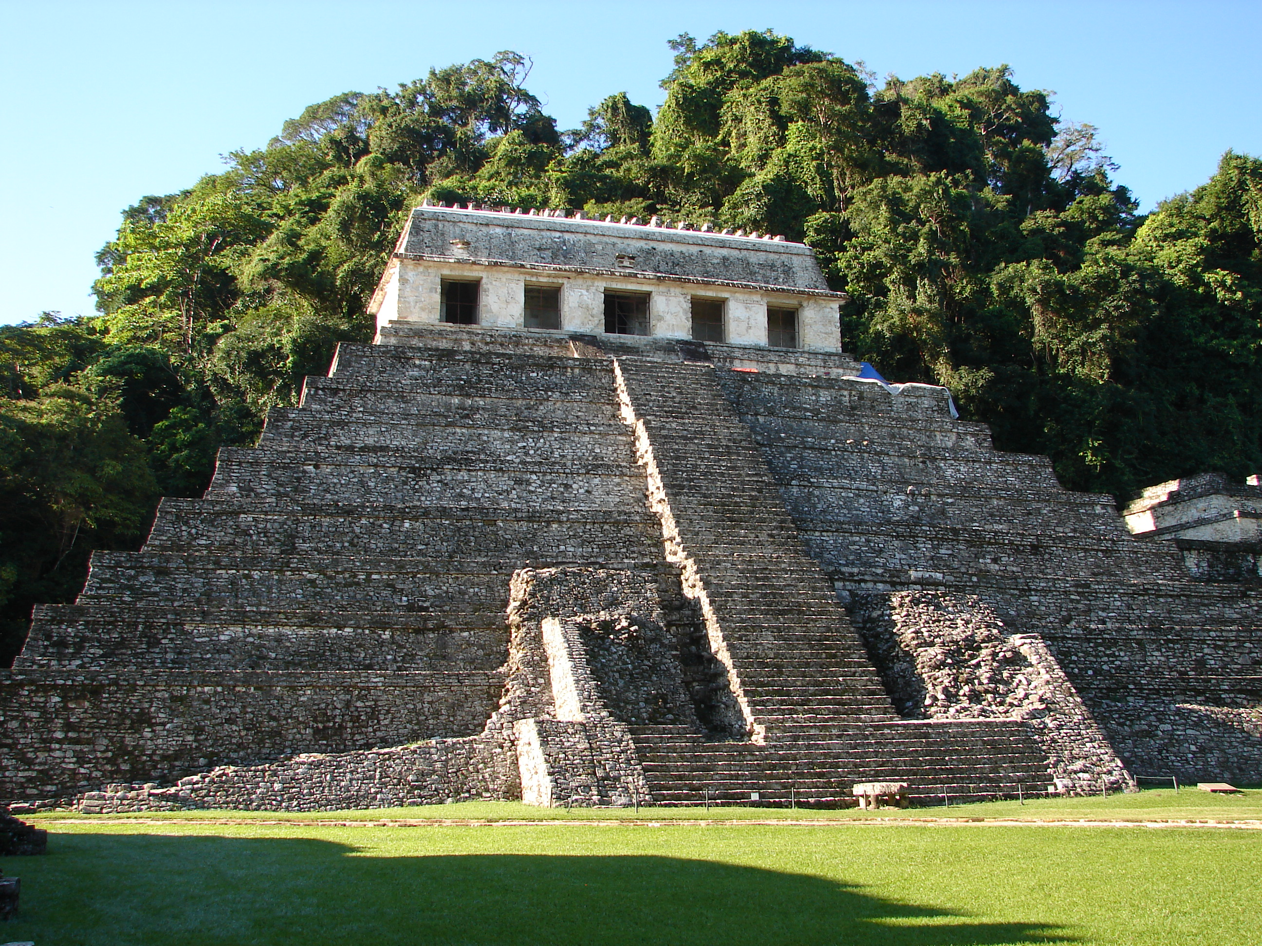 Temple of Inscriptions, Palenque